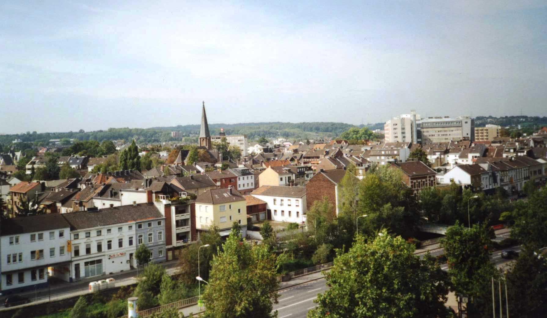 Blick über die Eschweiler-Südstadt von der Kantinenterrasse des Rathauses gen Süden - deutlich erkennbar rechterhand das St.-Antonius-Hospital